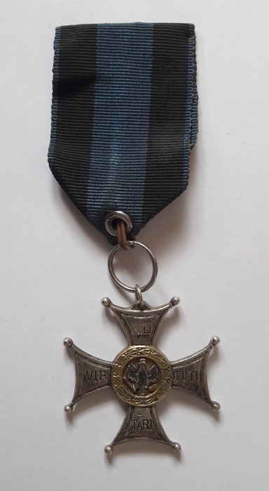 VM awers